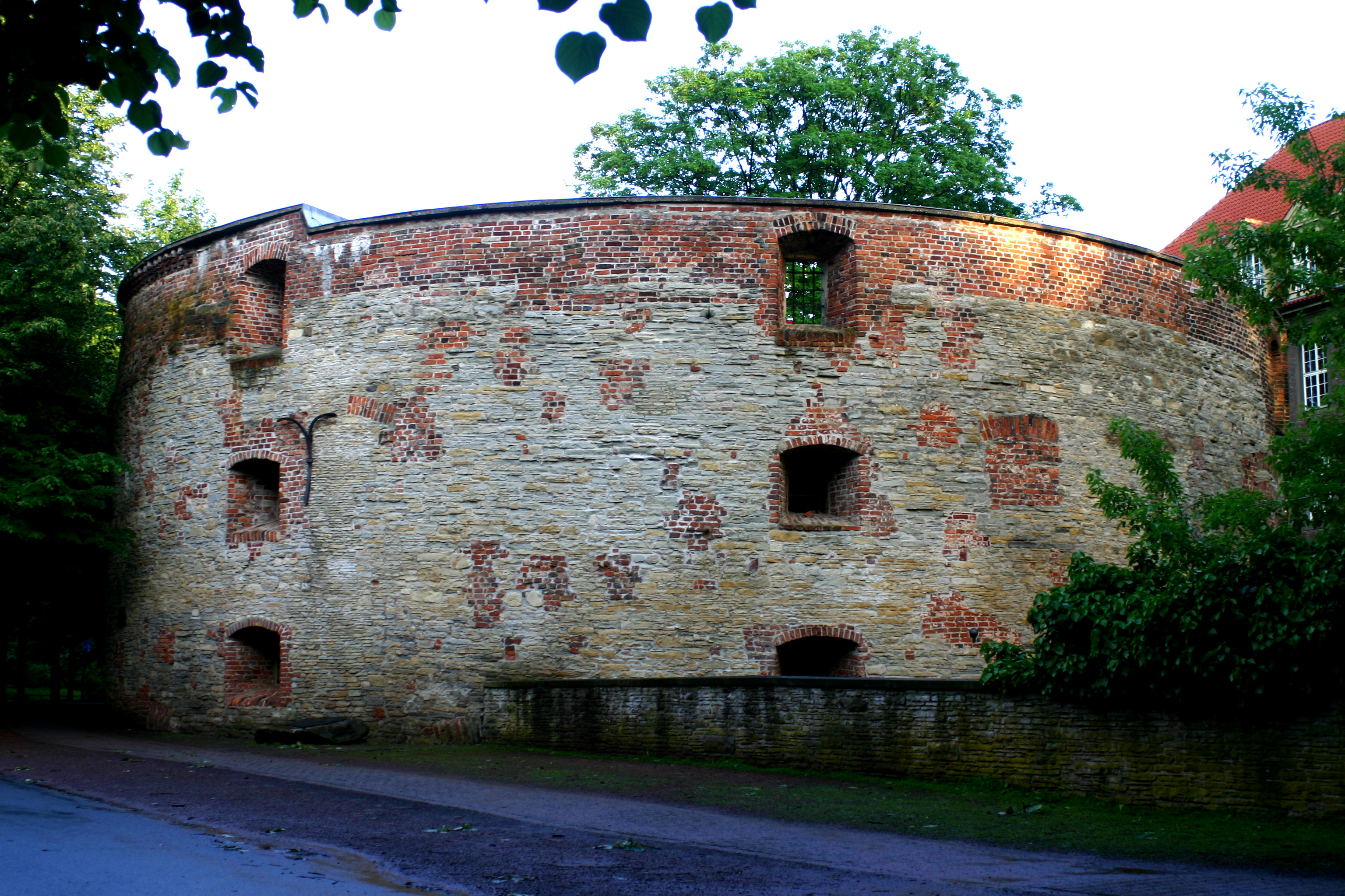 der Zwinger an der Pronemade im westfälischen Münster